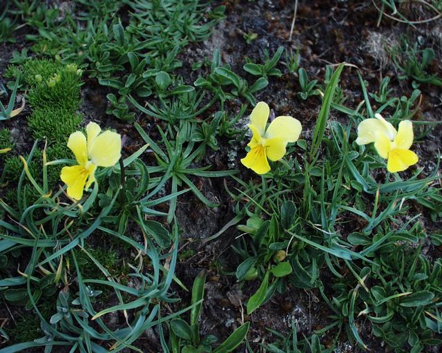 (en) Long-spurred Pansy (Viola calcarata), a photography originating of the internet site The accord of the autor, H. Brisse, is here. (fr) Pensée éperonnée (Viola calcarata), une photographie issue du site internet L'accord de l'auteur, H. Brisse, se situe ici.